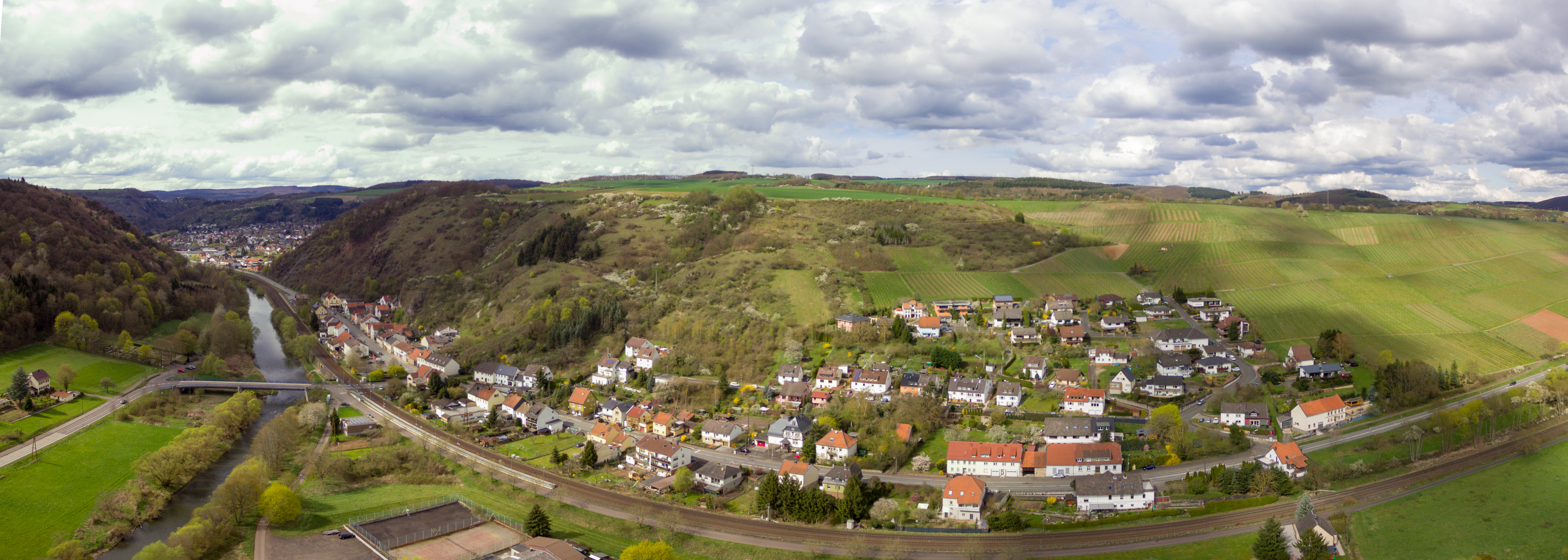 Luftbild von Martinstein